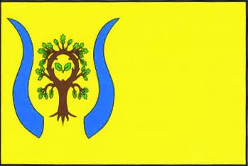 vlajka Dománovice